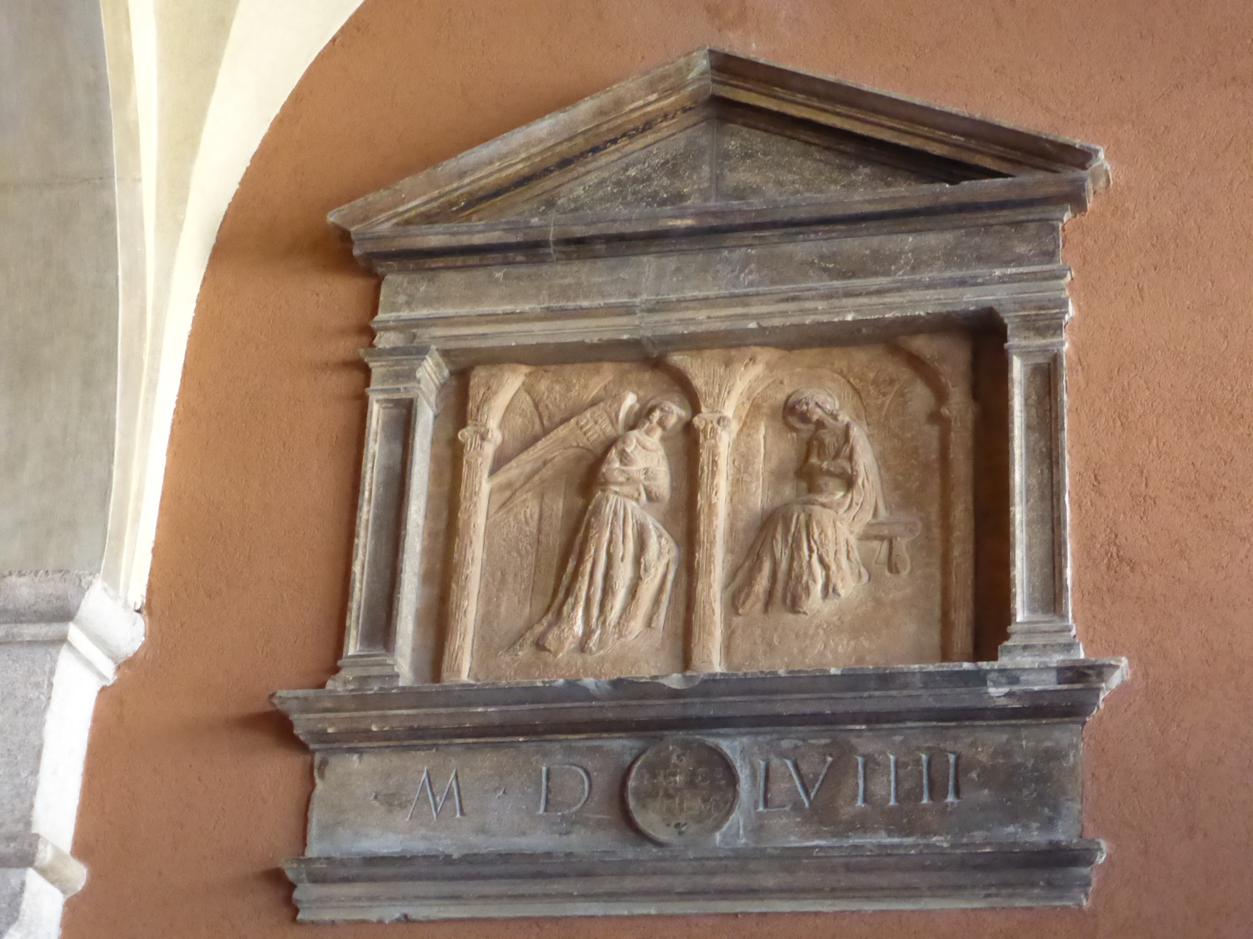 Baudetail im Fondaco dei Tedeschi, 16. Jahrhundert